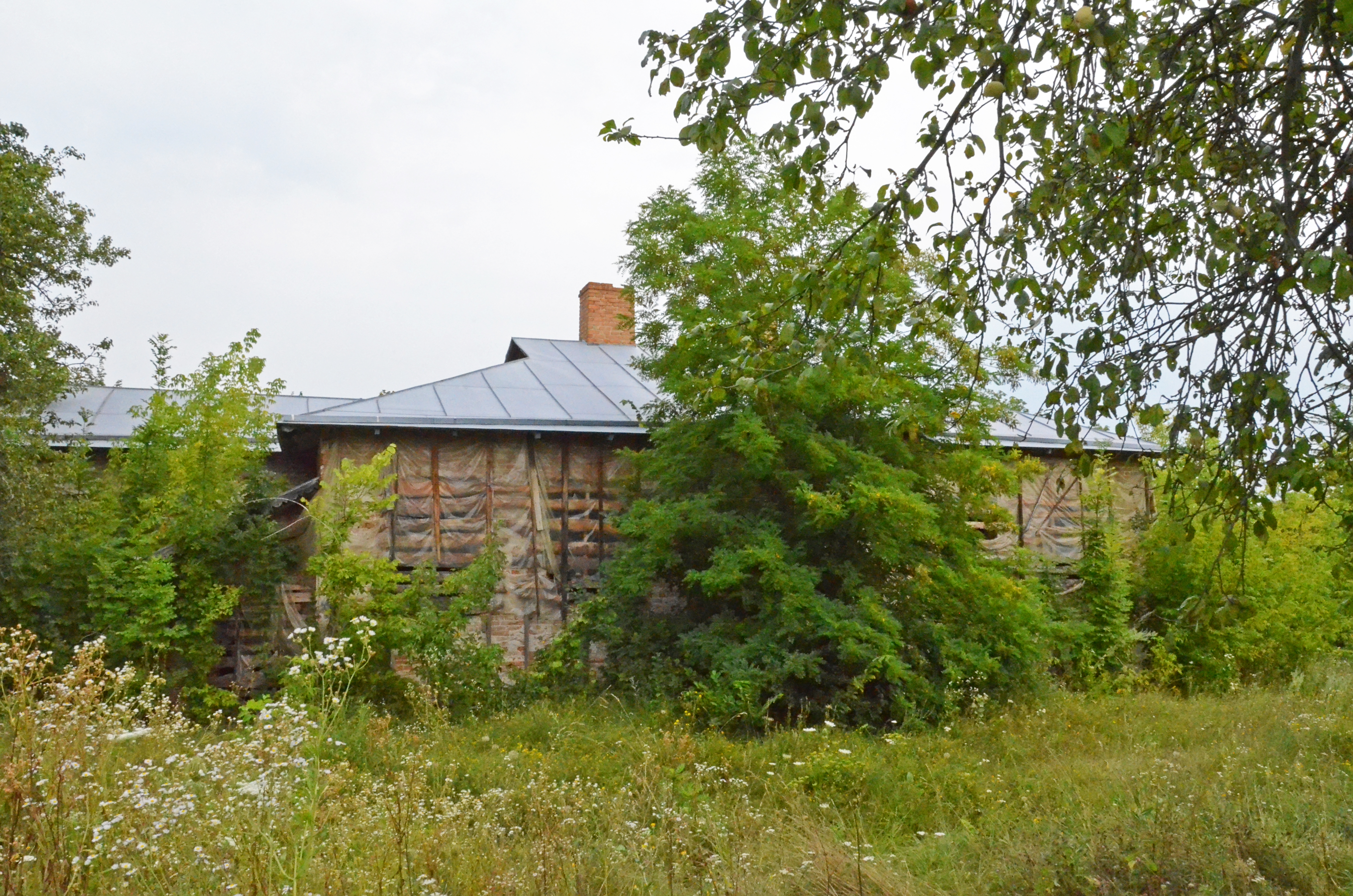 Садибний будинок Марко Вовчок (мур.), село Хохітва